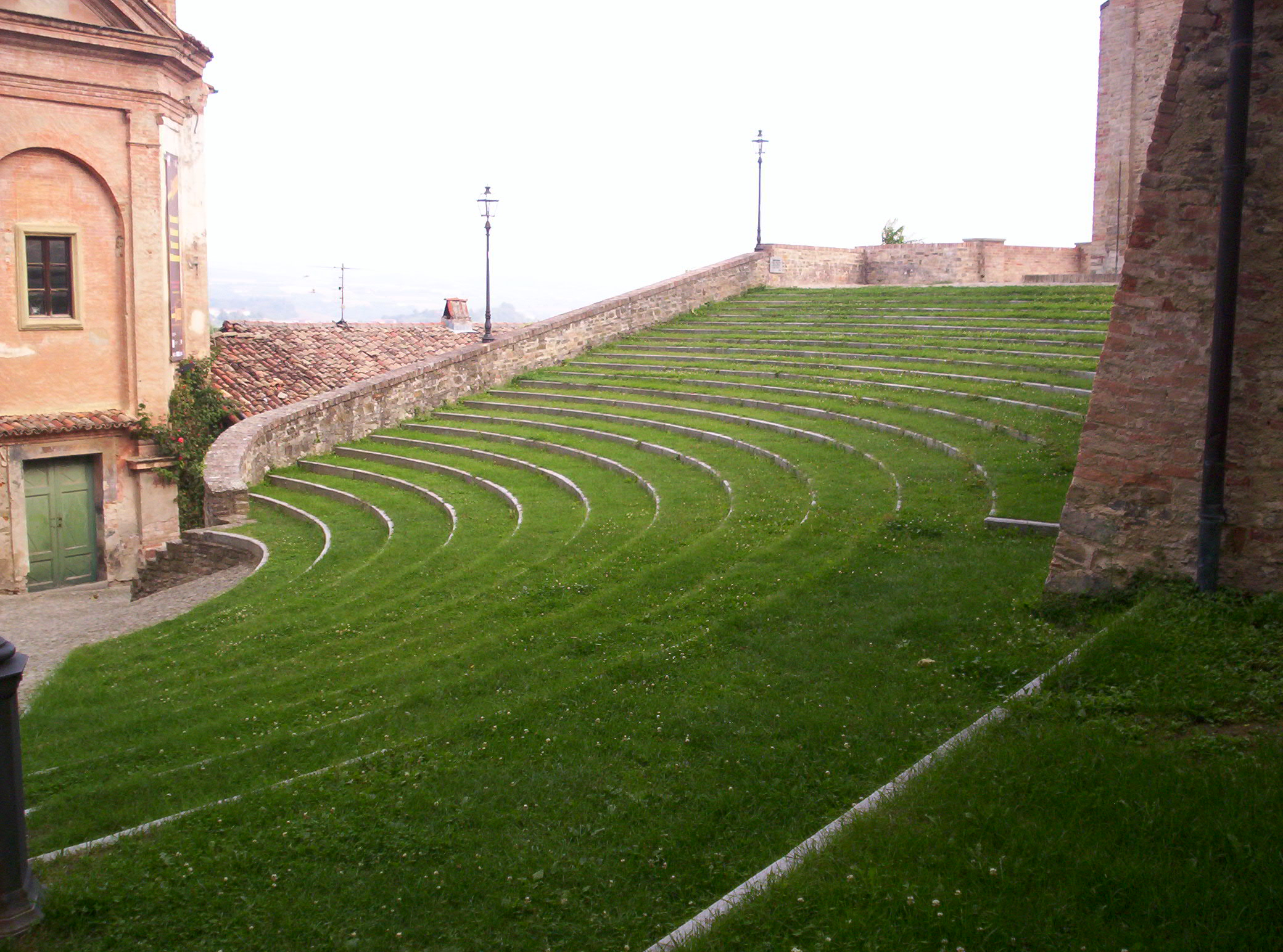 Anfiteatro di Monforte d'Alba (Cuneo) - Italy